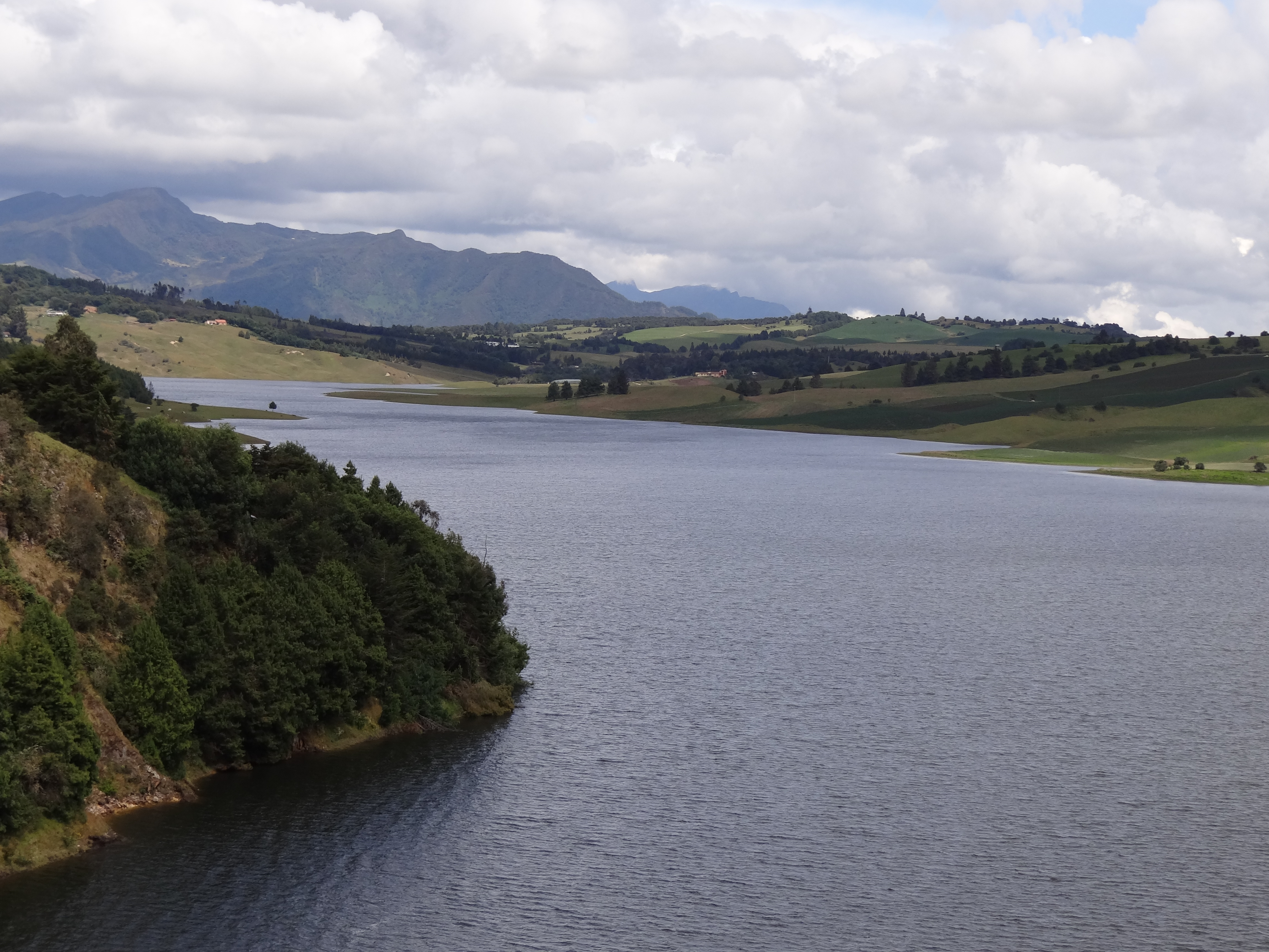 Embalse del Sisga en el municipio de Chocontá, departamento de Cundinamarca, Colombia